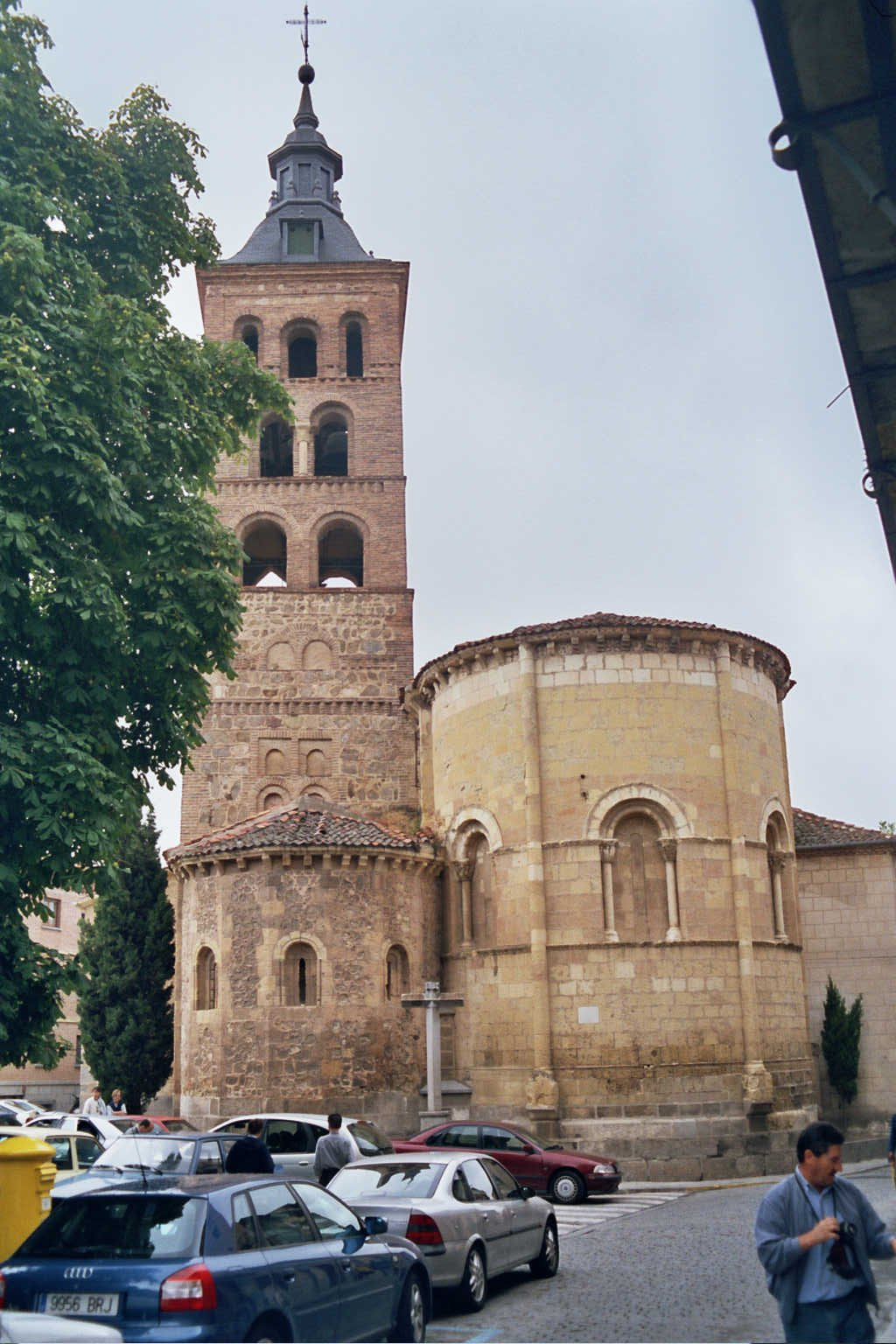 Segovia. (Castilla-León. España) Iglesia de San Andrés. Siglo XII. Fotografía realizada el 26 agosto de 2002 por el autor.User:Pelayo2.